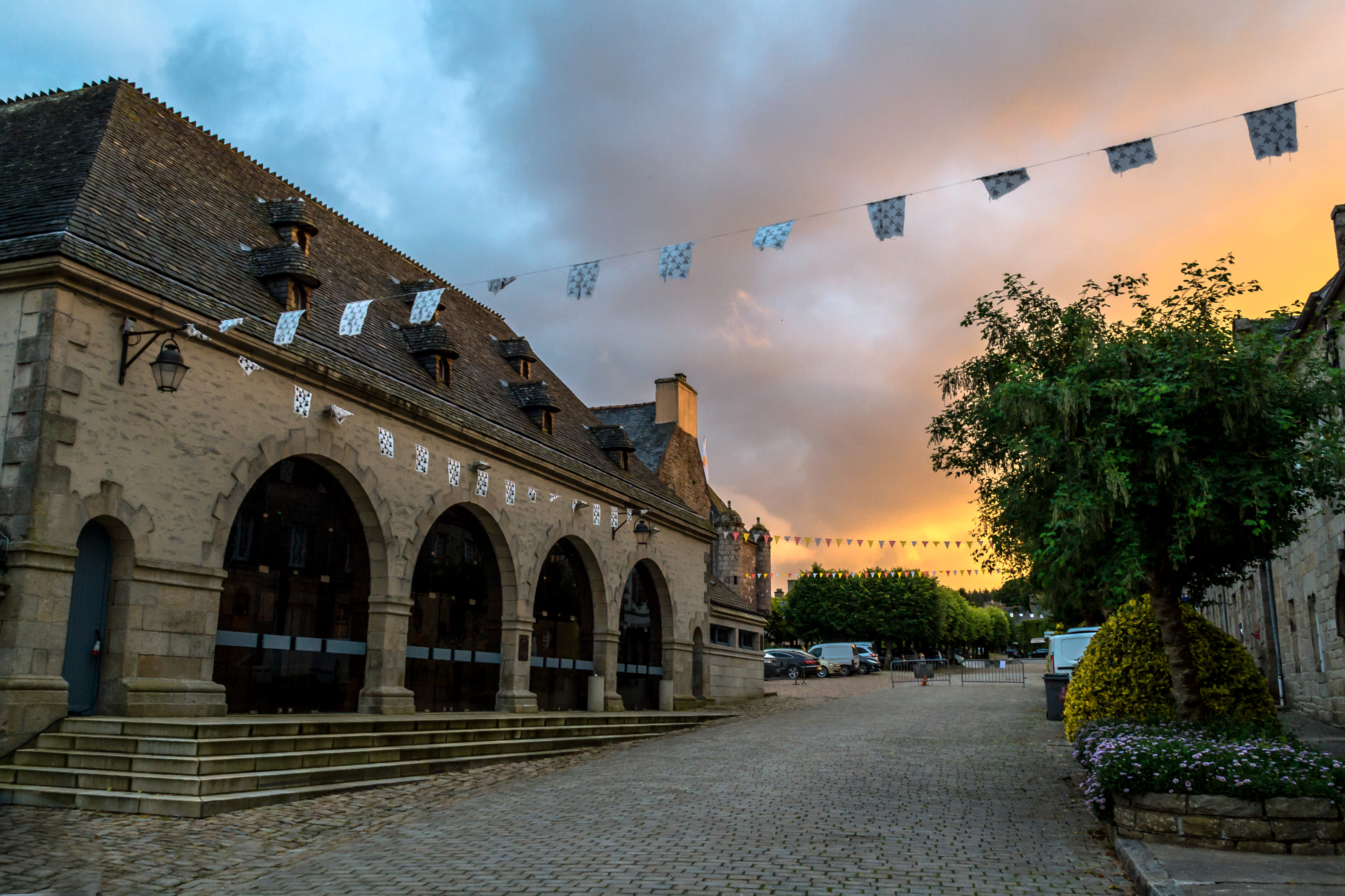 Les halles de Guerlesquin, reconstruites en 1882 et restaurées en 1975.